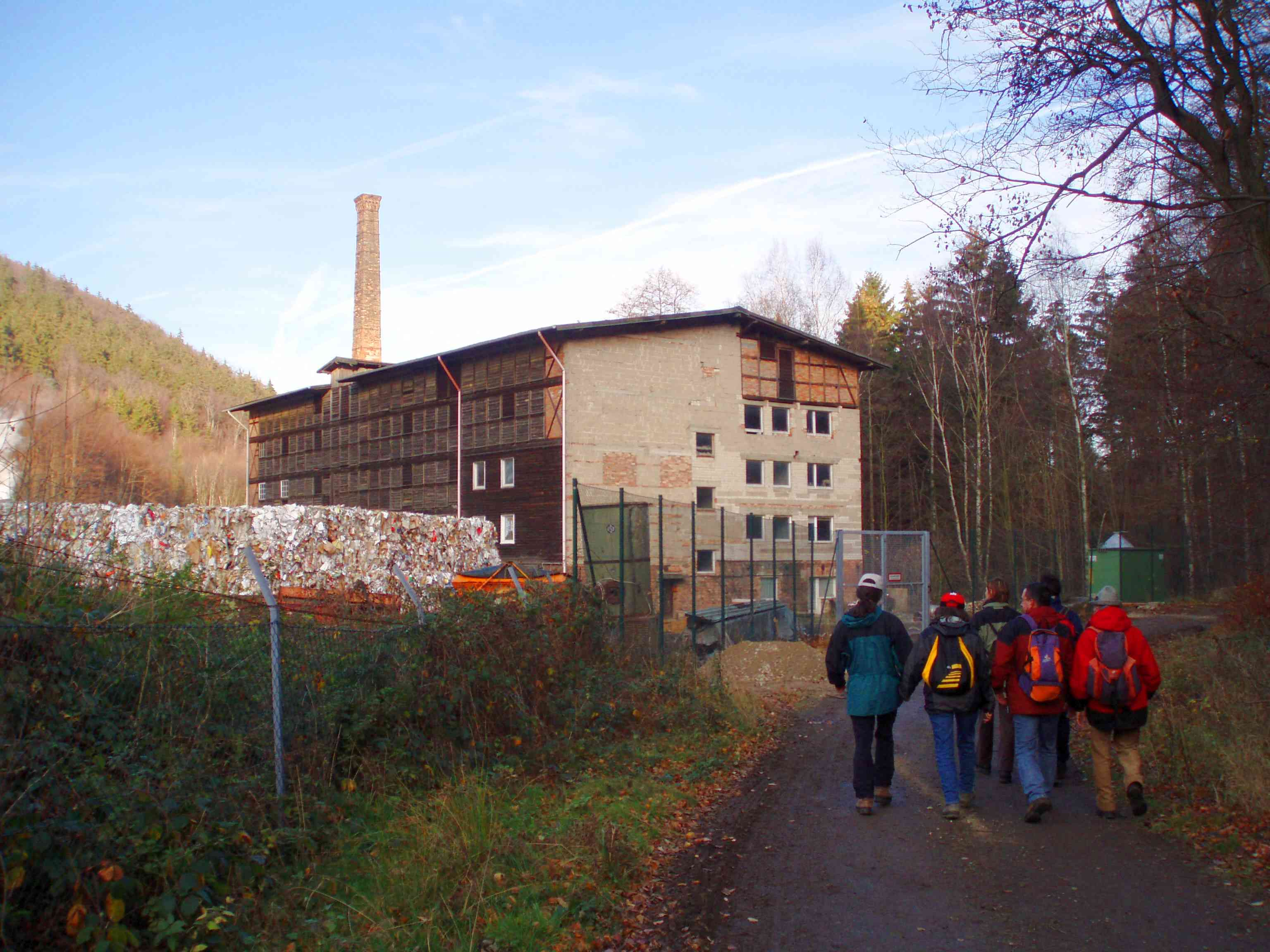 Pappenfabrik im oberen Eckertal